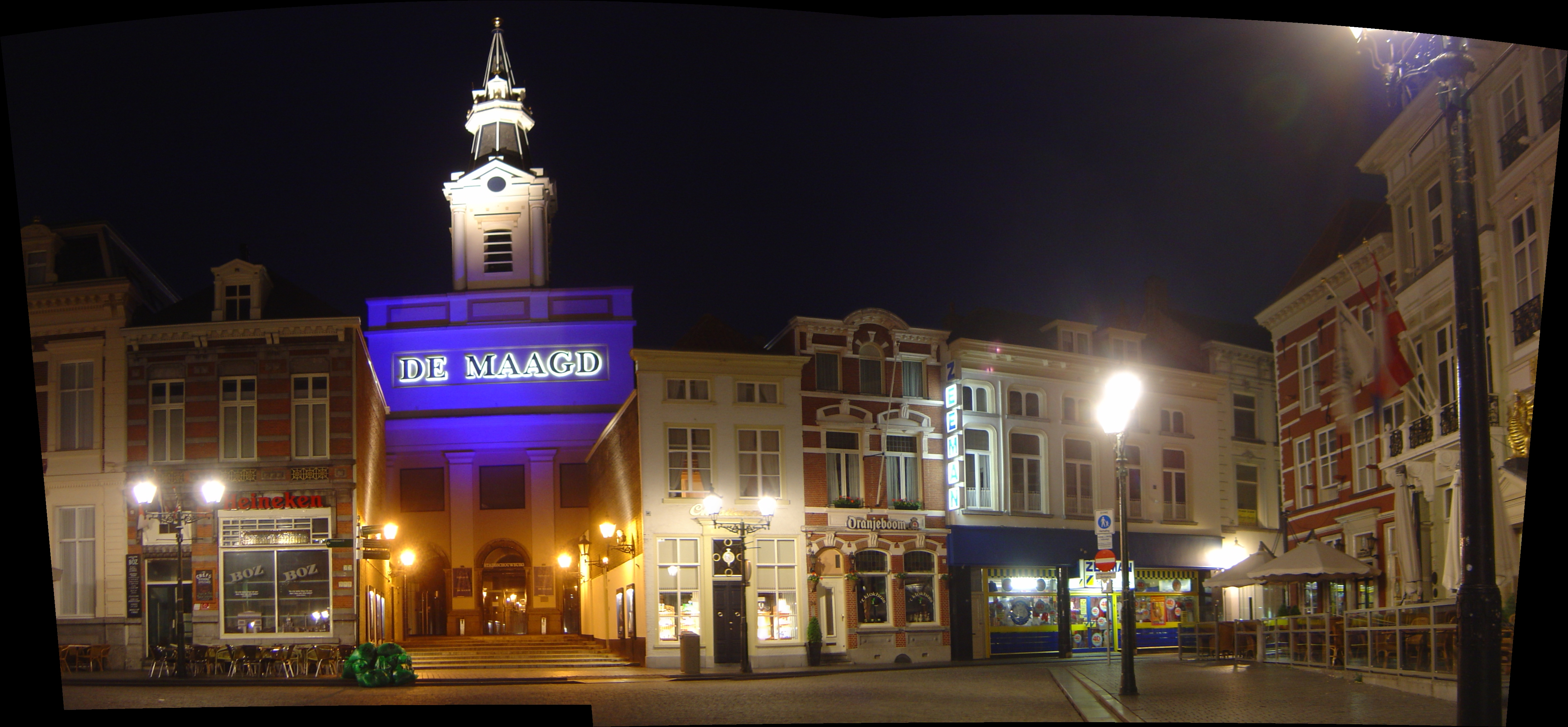 Stads schouwburg De Maagd aan de Grote Markt te Bergen op Zoom